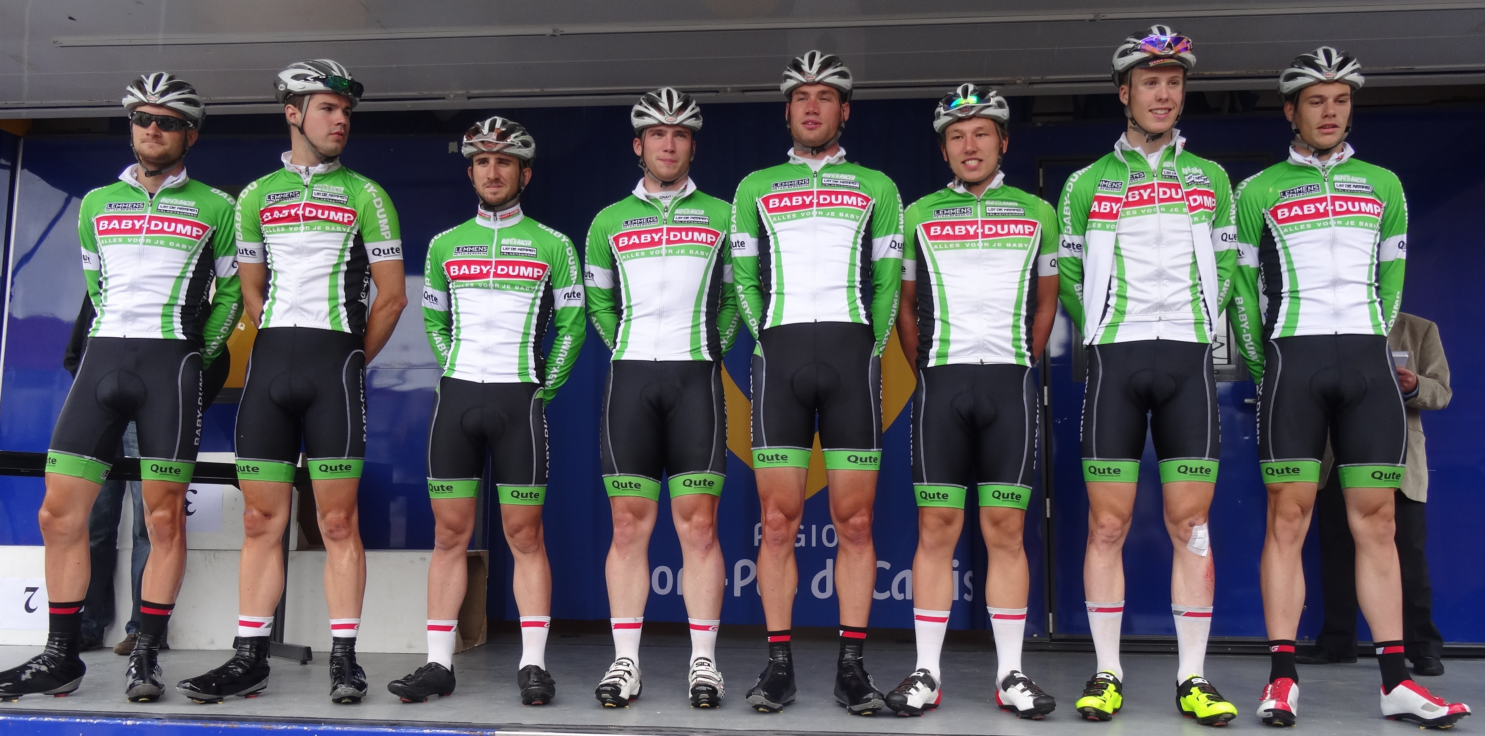 Reportage photographique réalisé le dimanche 13 juillet à l'occasion du départ et de l'arrivée de la Ronde pévéloise 2014 à Pont-à-Marcq, Nord-Pas-de-Calais, France.